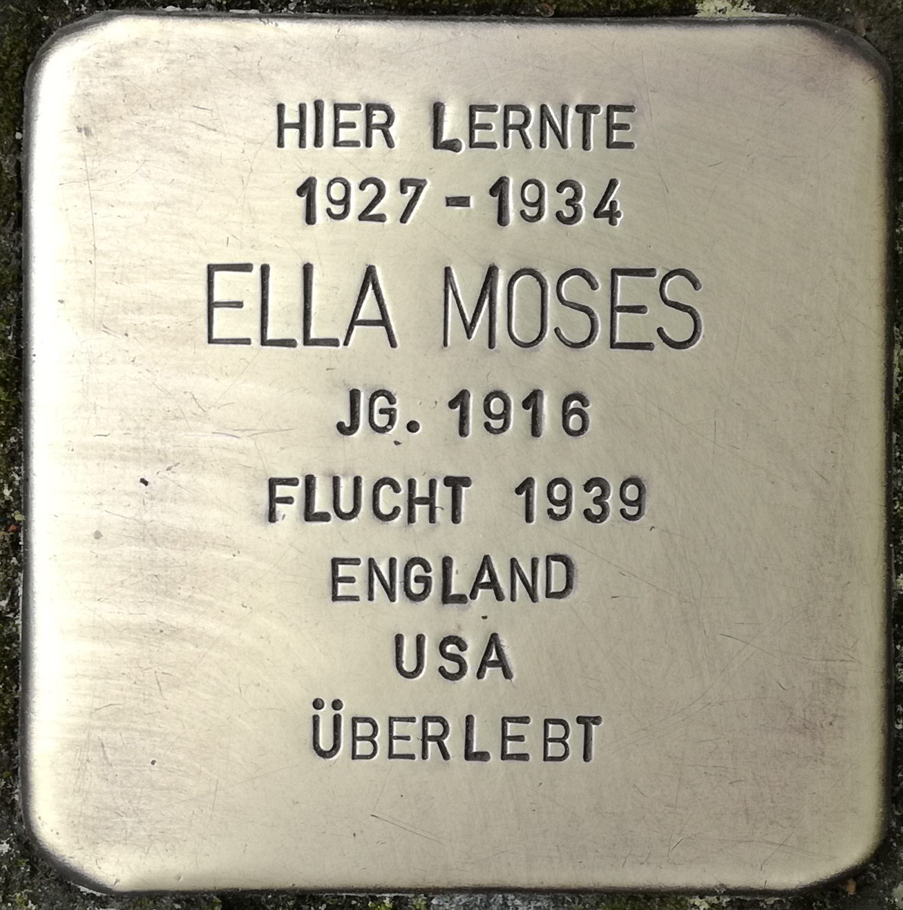 Hier lernte 1927 - 1934 Ella Moses Jahrgang 1916 Flucht 1939 England USA überlebt